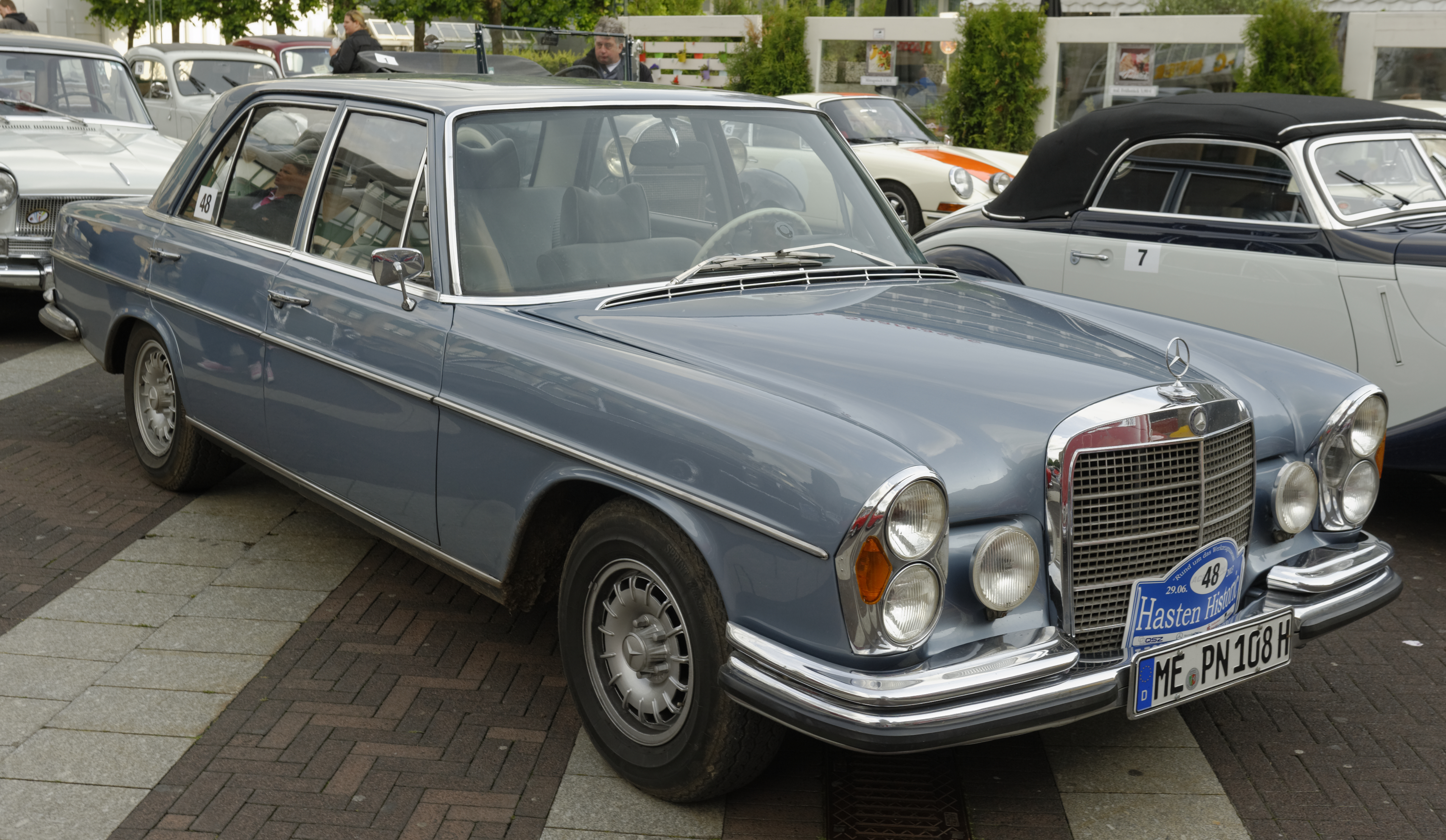 Oldtimershow in Remscheid Juni 2013